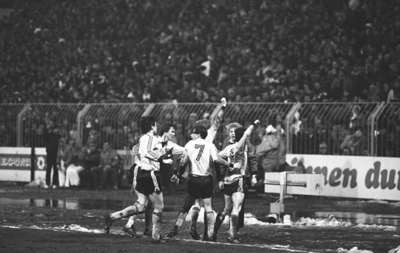 ADN-ZB/Häßler/5.3.1986 Dresden: Fußball/Europapokal der Pokalsieger / Hinspiele, Jubel nach dem 1:0 durch Frank Lippmann (r.) in der 50. Minute. Mit ihm freuen sich Jörg Stübner (Nr. 7), Matthias Döschner (2.v.l.) und Andreas Trautmann. Die Dresdner gewannen das Spiel mit 3:0.